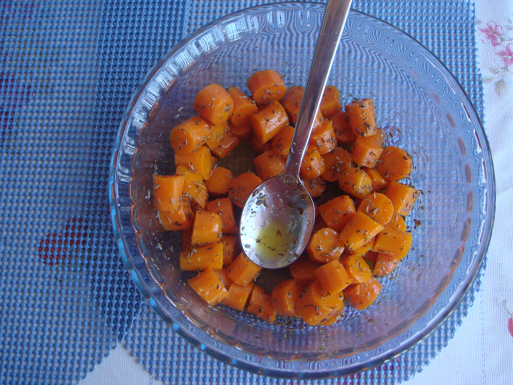 Zanahorias aliñas, provincia de Cádiz, España.